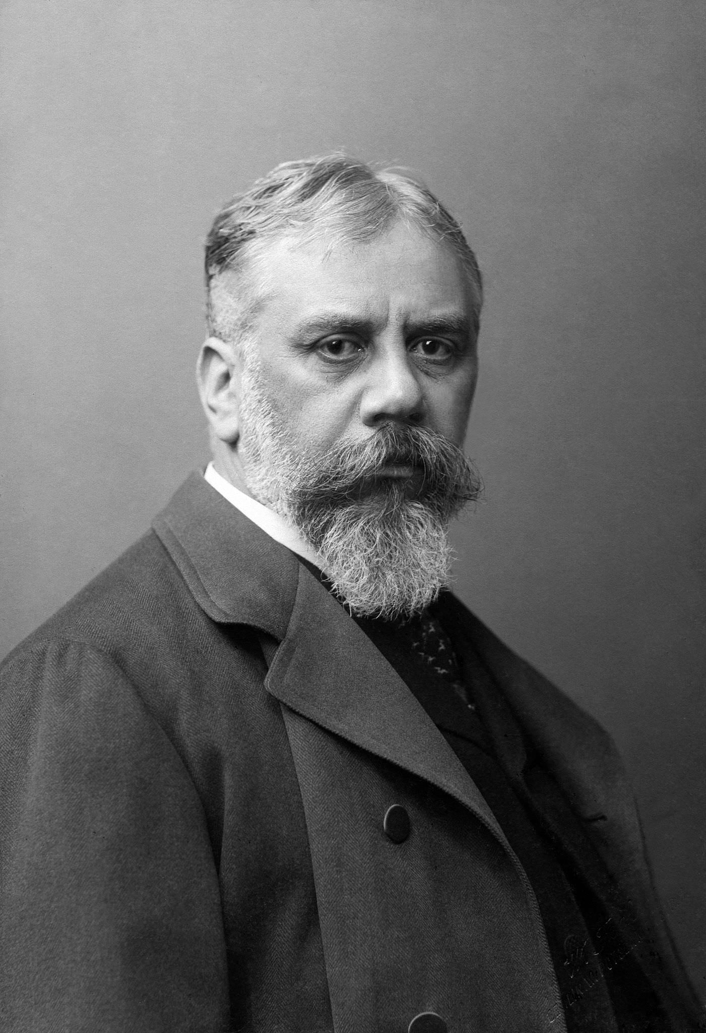 Photographie des Malers Josef Scheurenberg, c. 1900